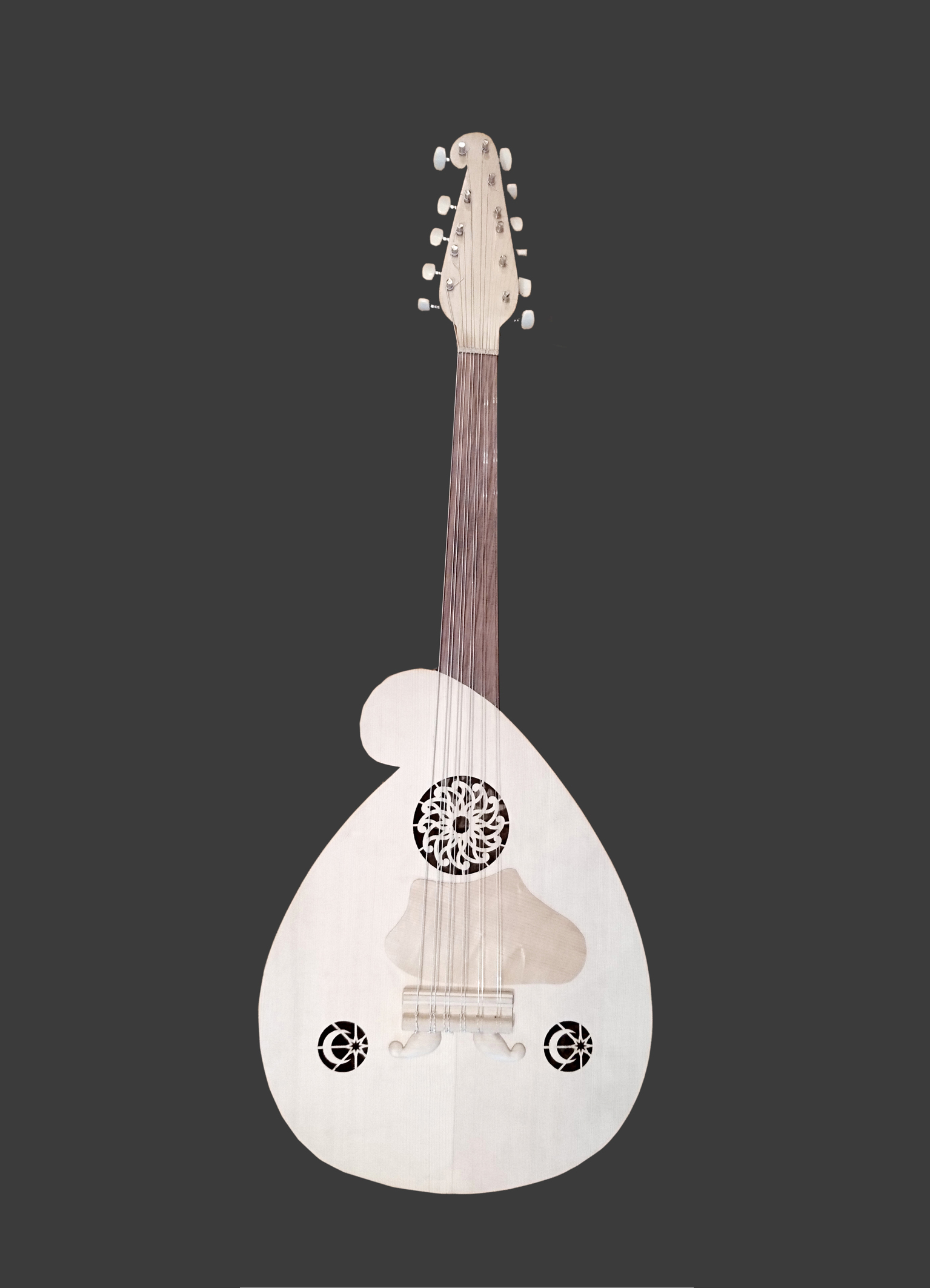 Azərbaycanın Milli mizrablı-simli musiqi aləti